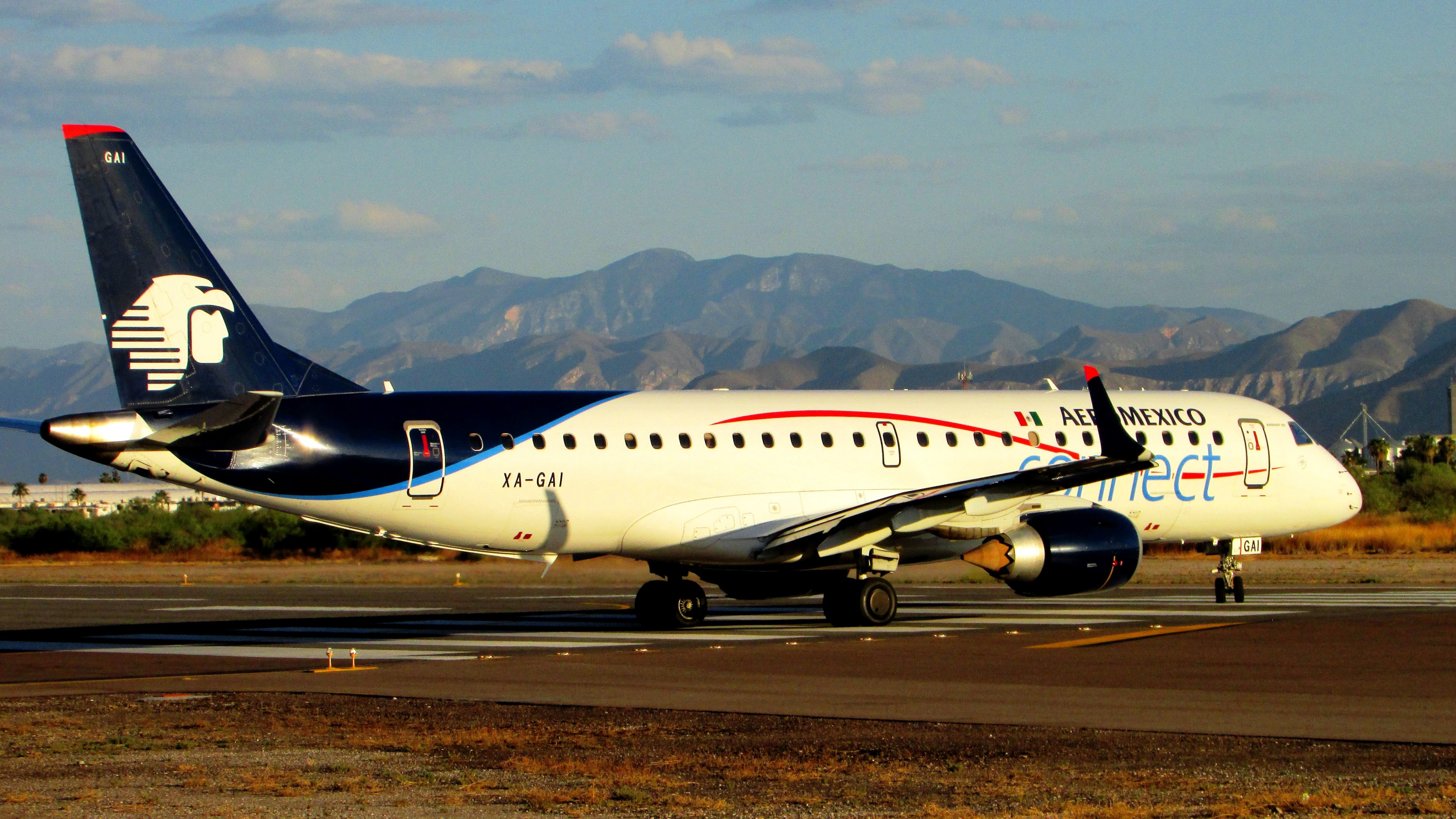 La pista 13, aunque no es la activa con viento calma, es viable para aeronaves que se dirijan al sur (como es el caso de este vuelo 203 a la Ciudad de México) debido a que les permite realizar una salida directa en vez de salir hacia el norte y realizar un giro completo.